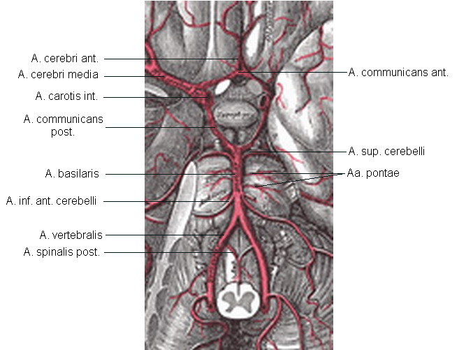 Arteria basilaris nach Gray´s Anatomie (Public domain)